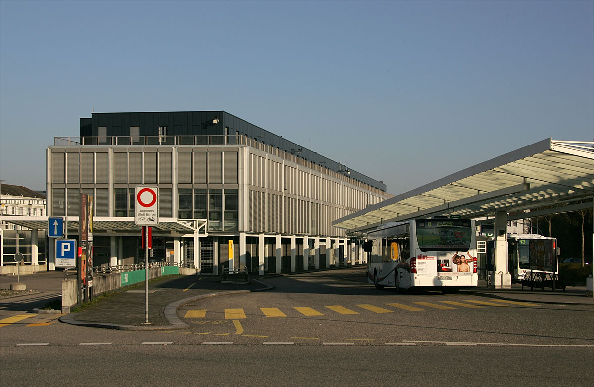 Busperron beim SBB-Bahnhof in Zofingen